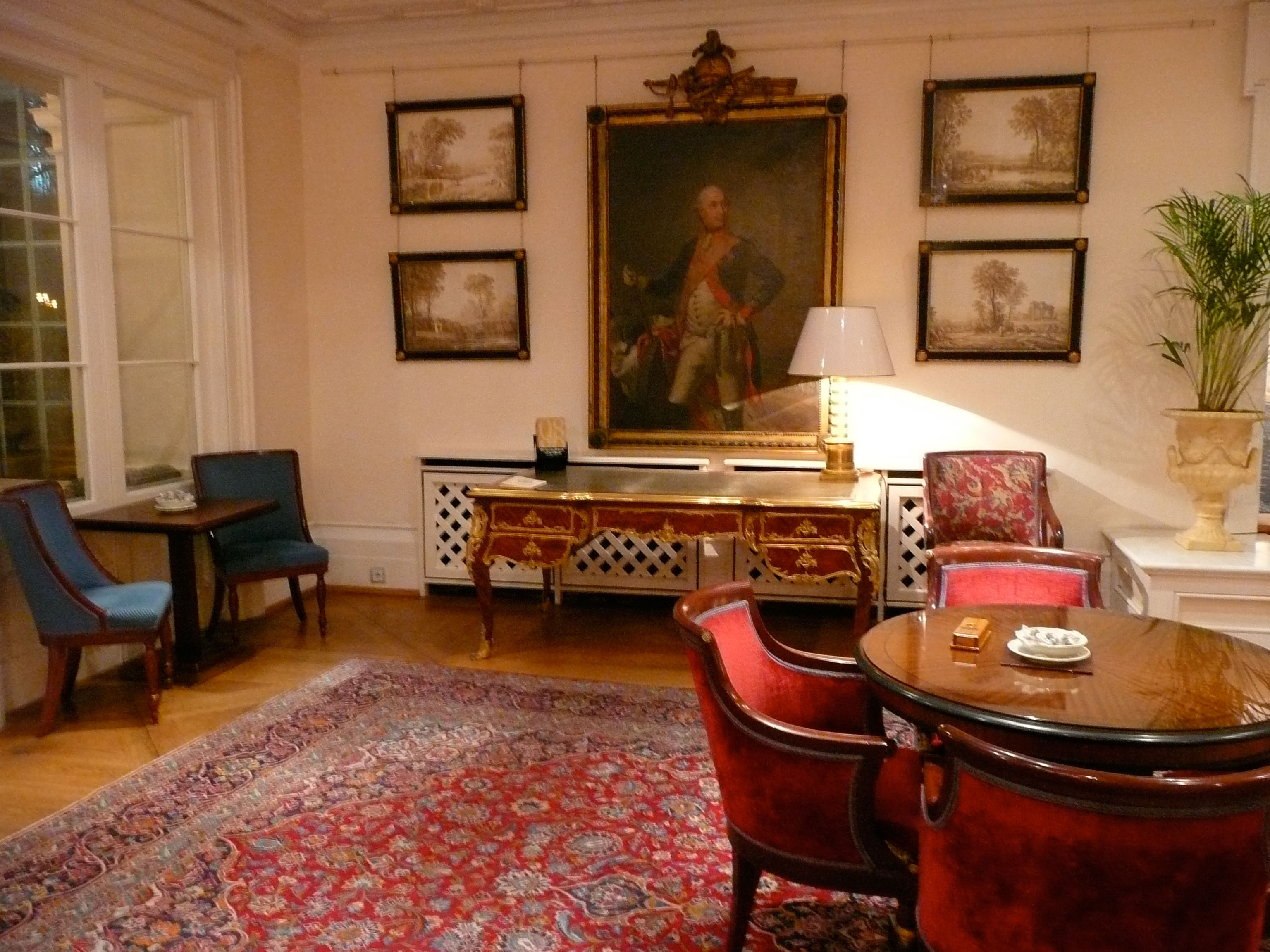 Eingangsbereich des Hotels Hessischer Hof.